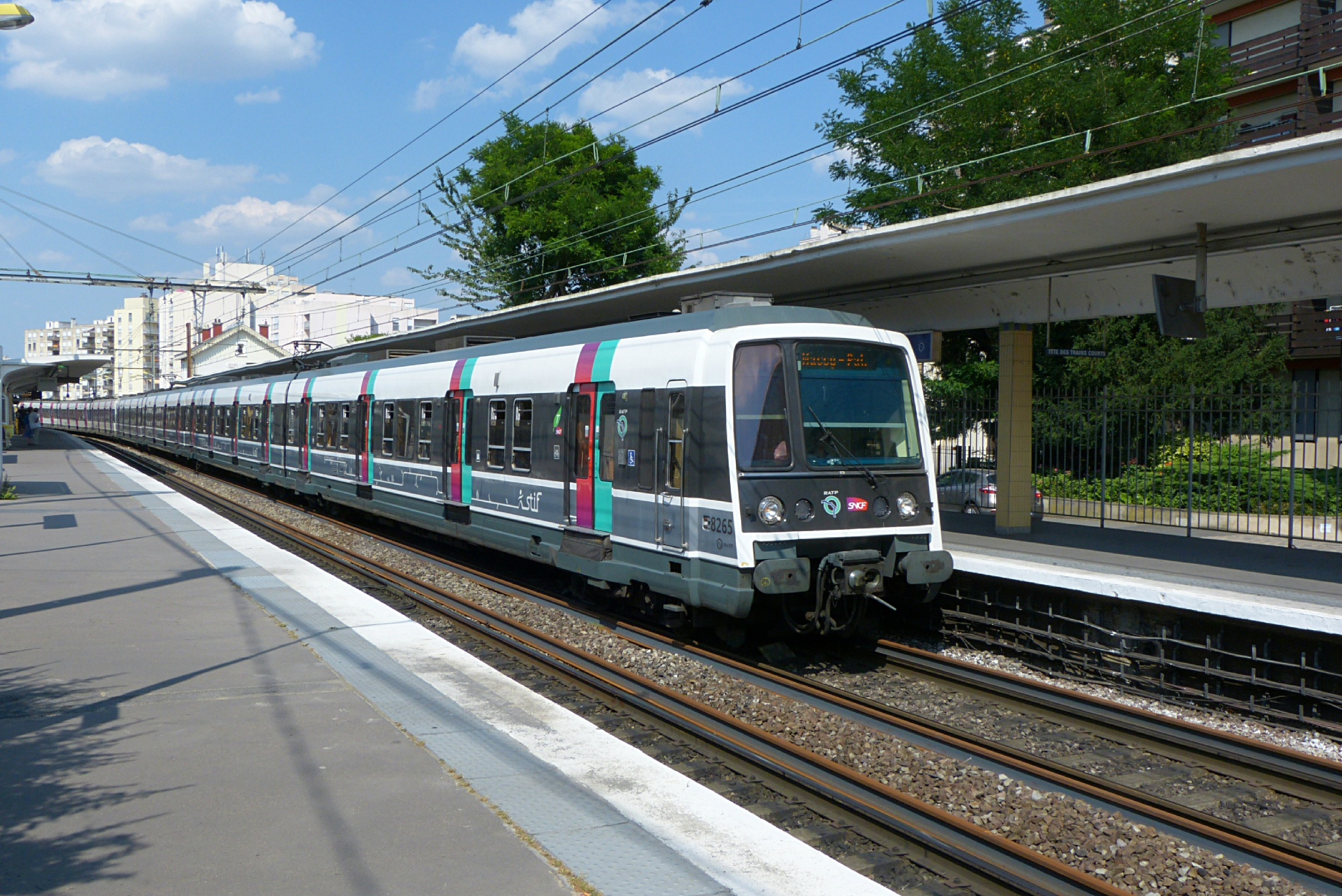 MI79 Rénové à Bourg La Reine